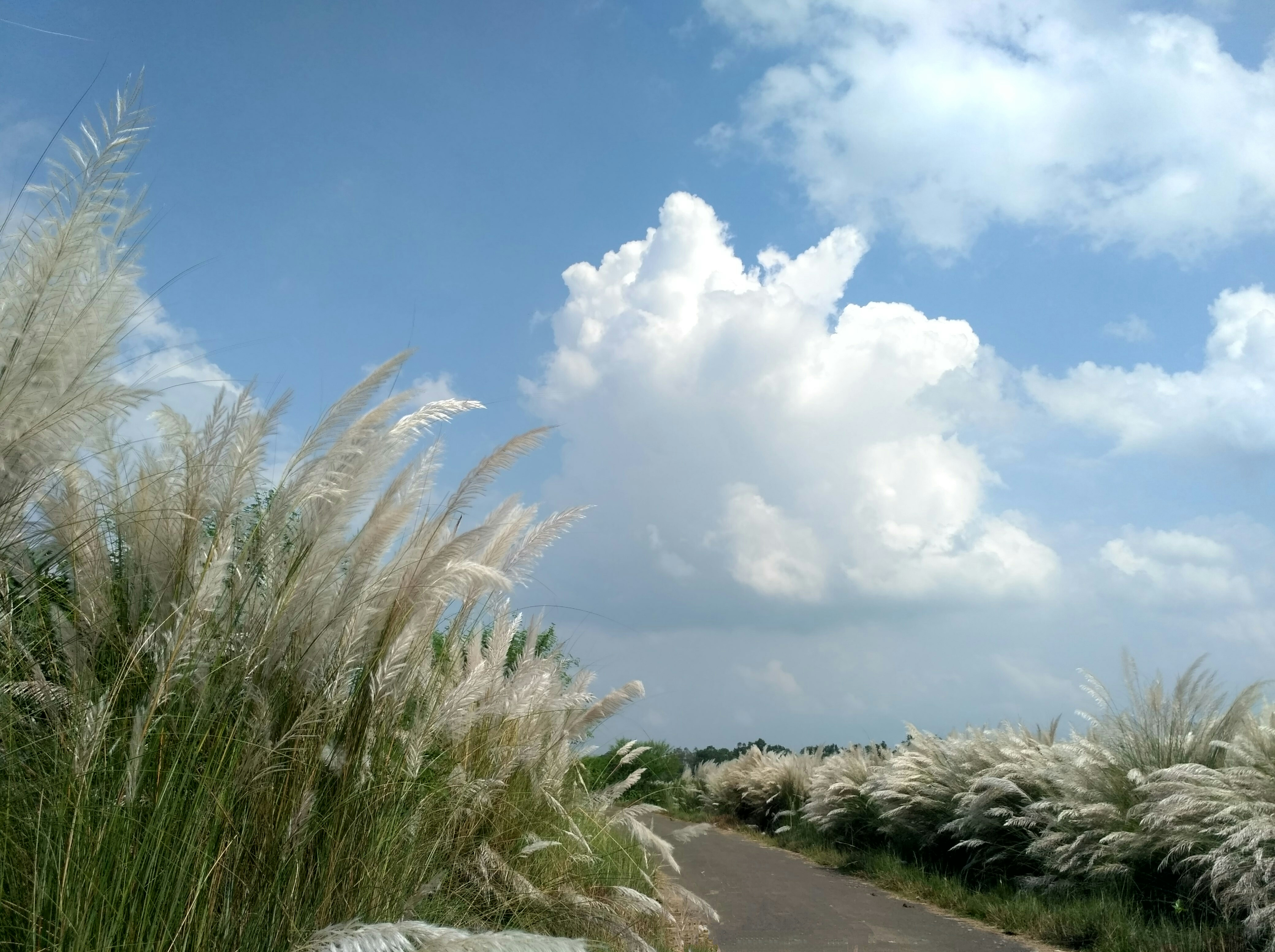 পুকুর পাড়ে রাস্তার দু-পাশে বেড়ে ওঠা কাশ বন